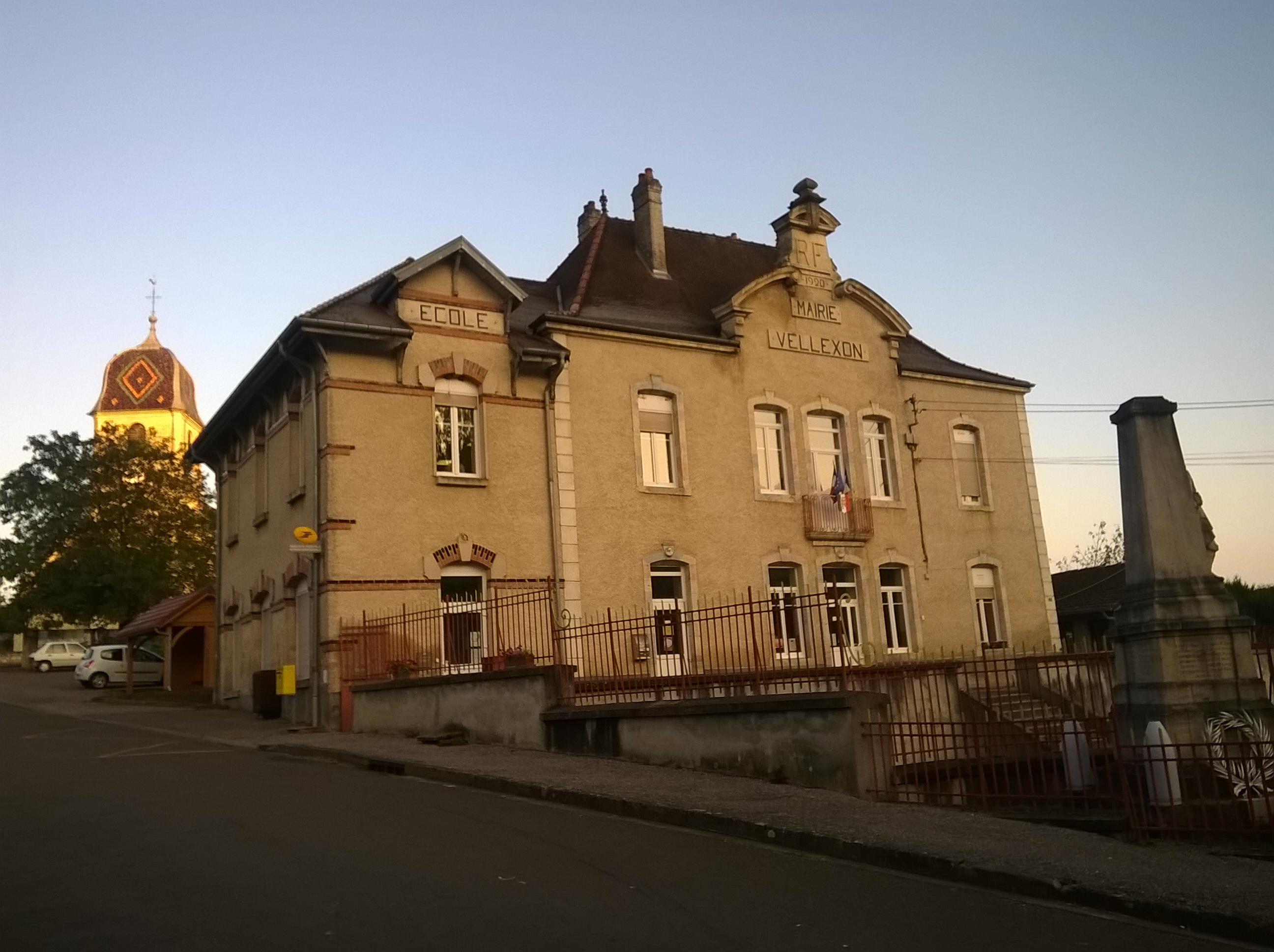 Vellexon-Queutrey-et-Vaudey